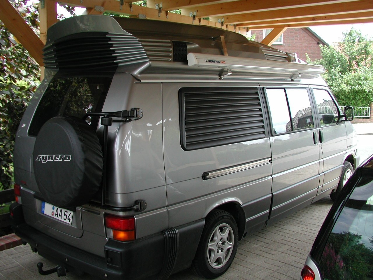 VW Dehler Typ2 T4 Optima 5.4 Syncro Baujahr 06/1998